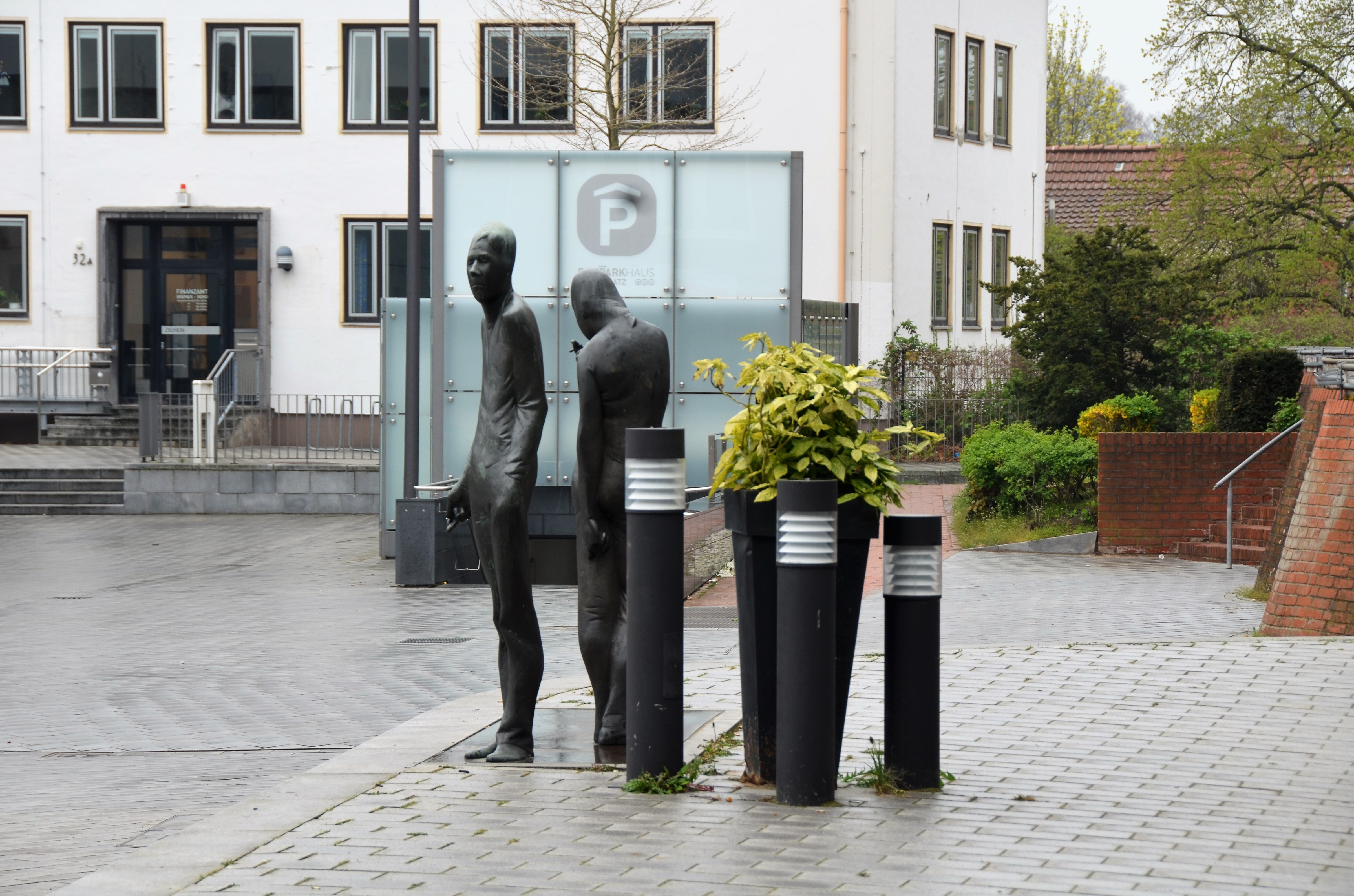 Figurenskulptur Zu zweit allein von Waldemar Otto von 1986, auf der Terrasse des Gustav-Heinemann-Bürgerhauses am Sedanplatz in Bremen-Vegesack